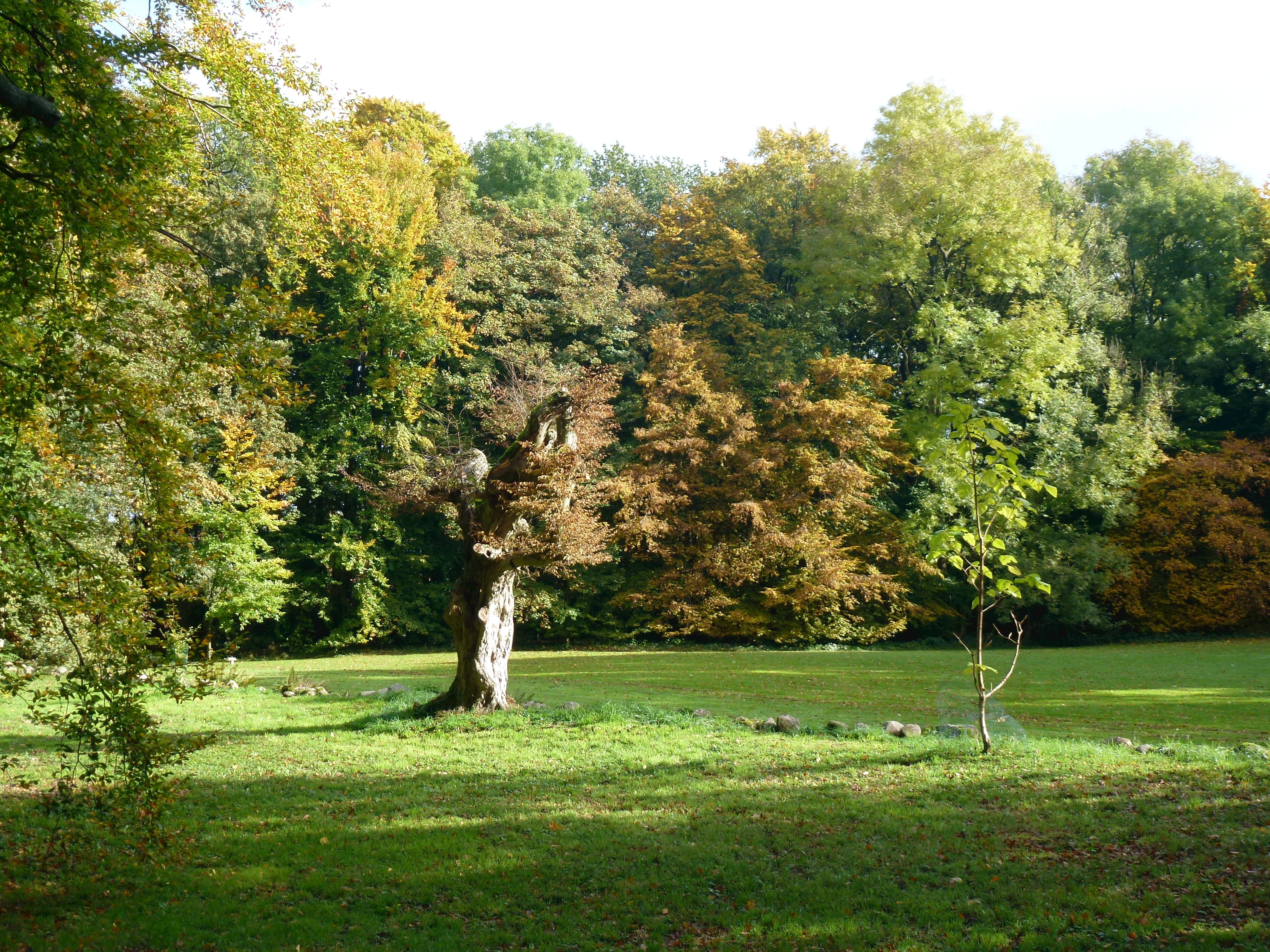 Schloss Kalkhorst, Schlossgarten